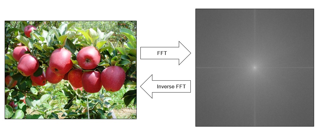 Como podemos ver, uma imagem no domínio da frequência pode ser convertida para uma imagem no domínio do espaço e vice-versa através da transformada de Fourier (FFT) e de sua Inversa (Inverse FFT)